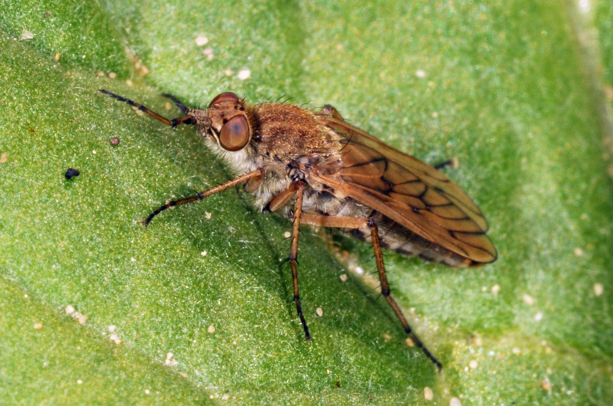 Therevidae spec., Pfungstädter Düne, Pfungstadt, Hessen, Deutschland